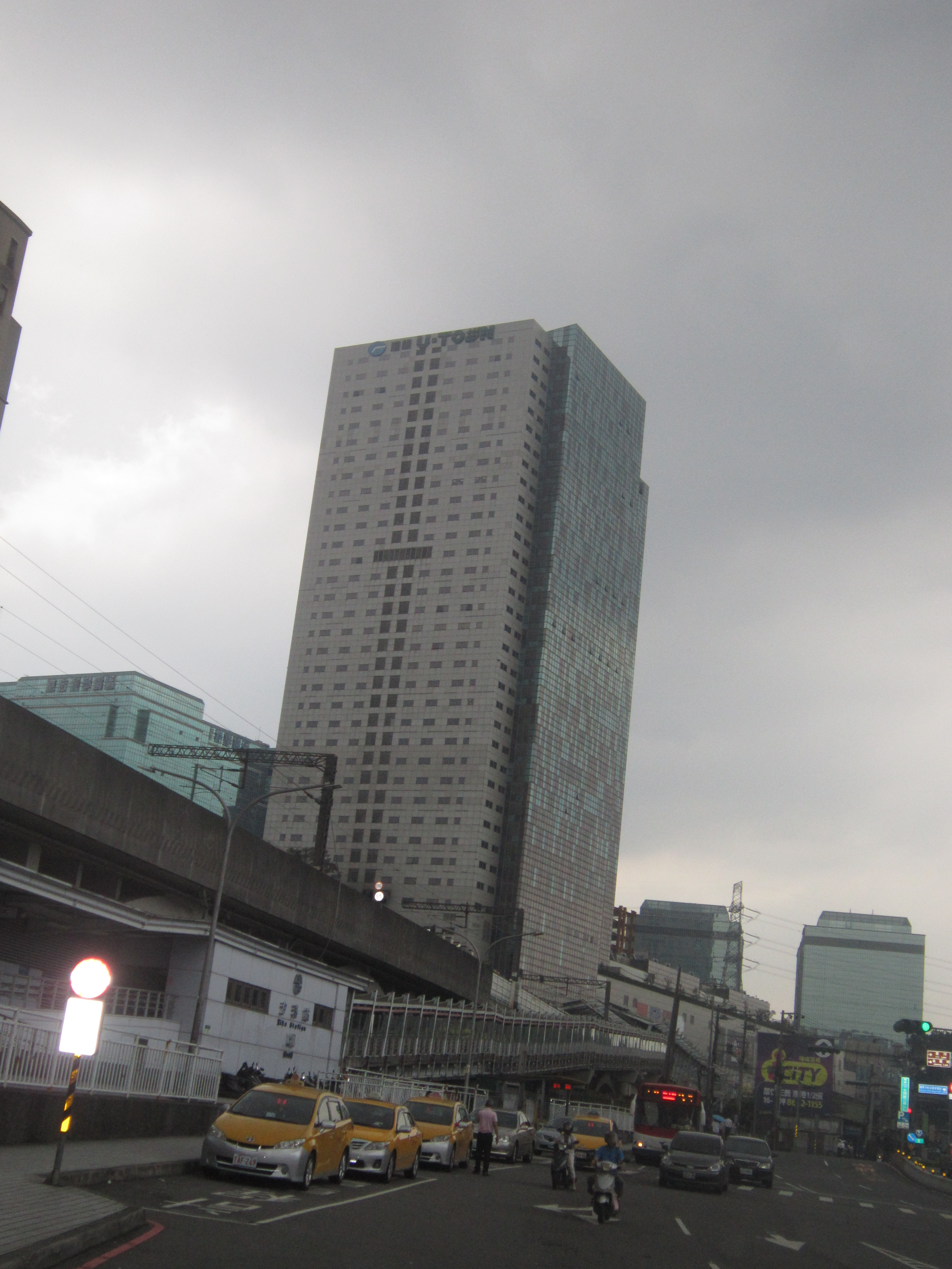 遠雄U-TOWN廠辦大樓與臺灣鐵路管理局汐科車站。